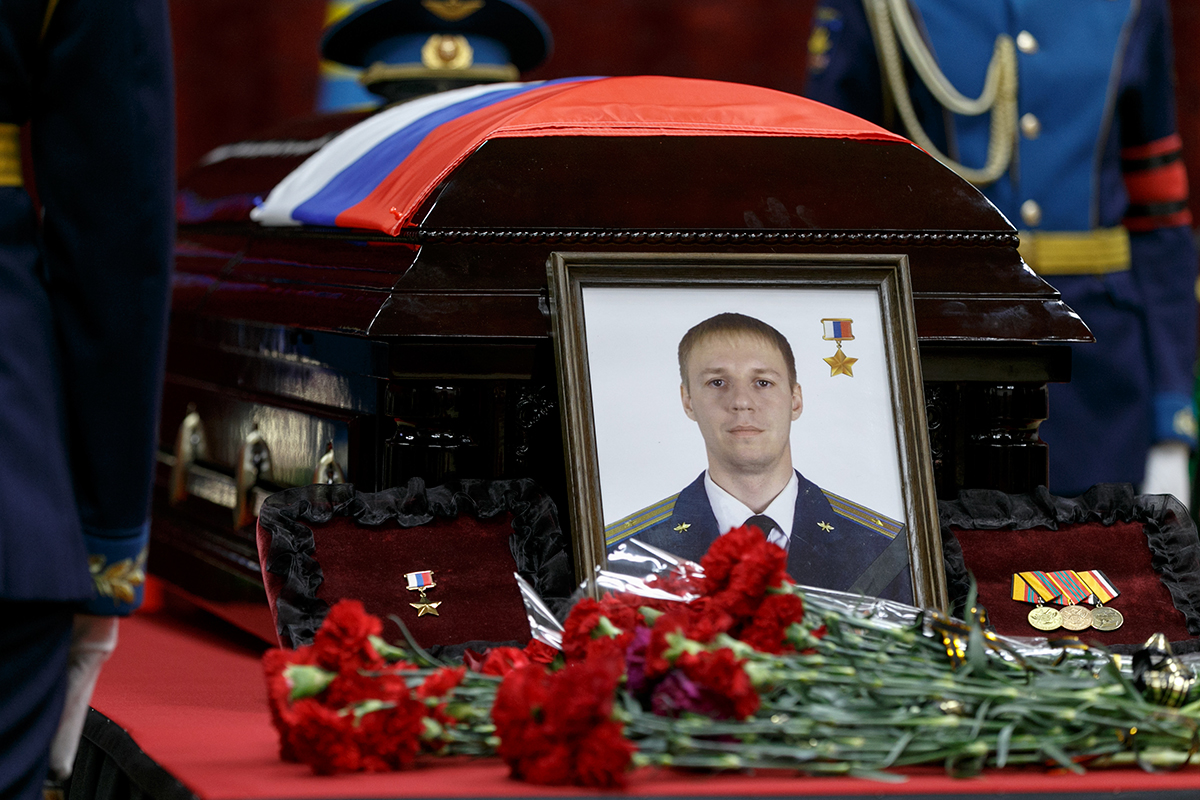 Памяти Героя. Прощание с Героем России гвардии майором Романом Филиповым. Дом офицеров Северного военного городка Воронежа